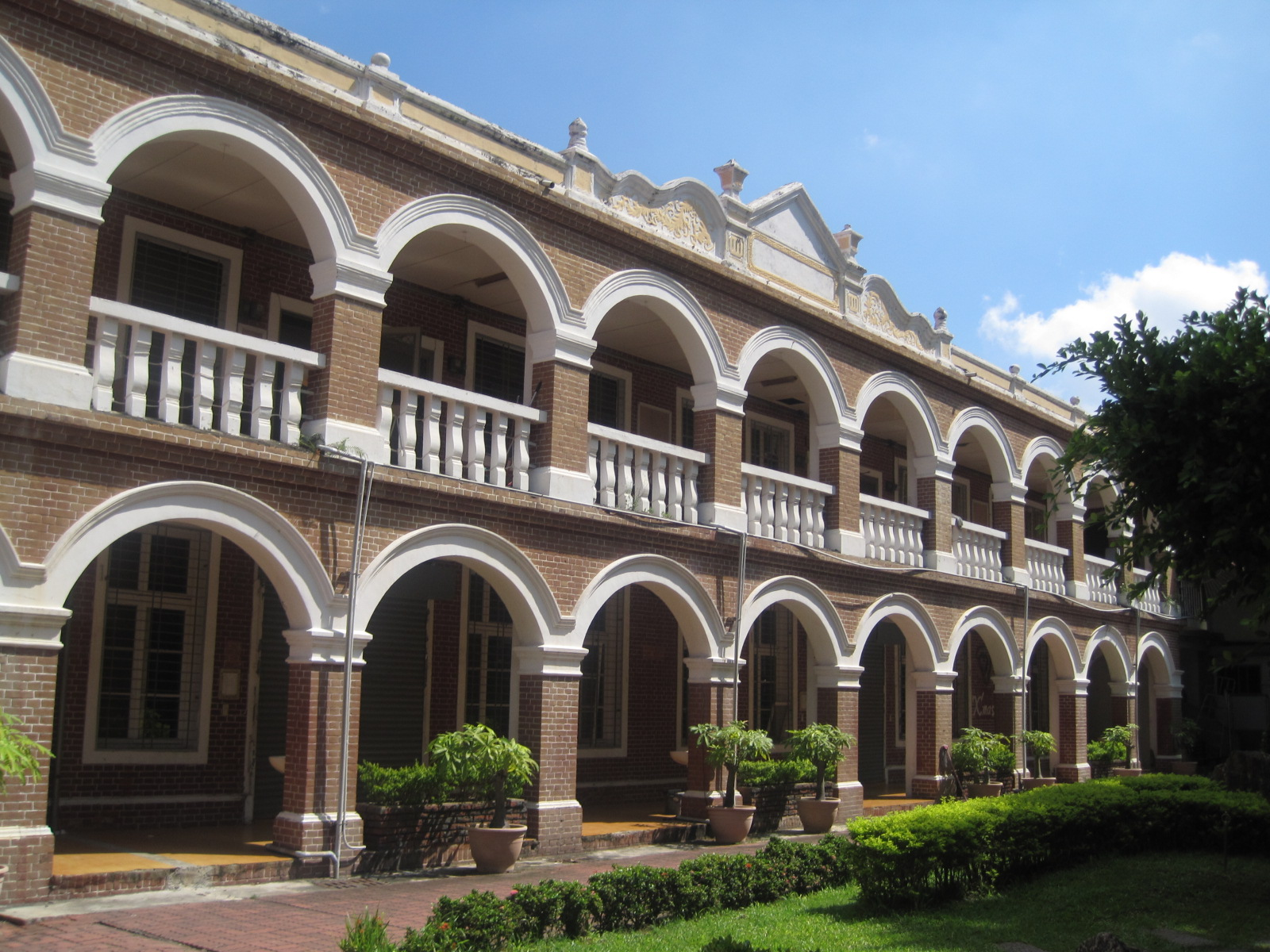 長榮中學光鹽學舍